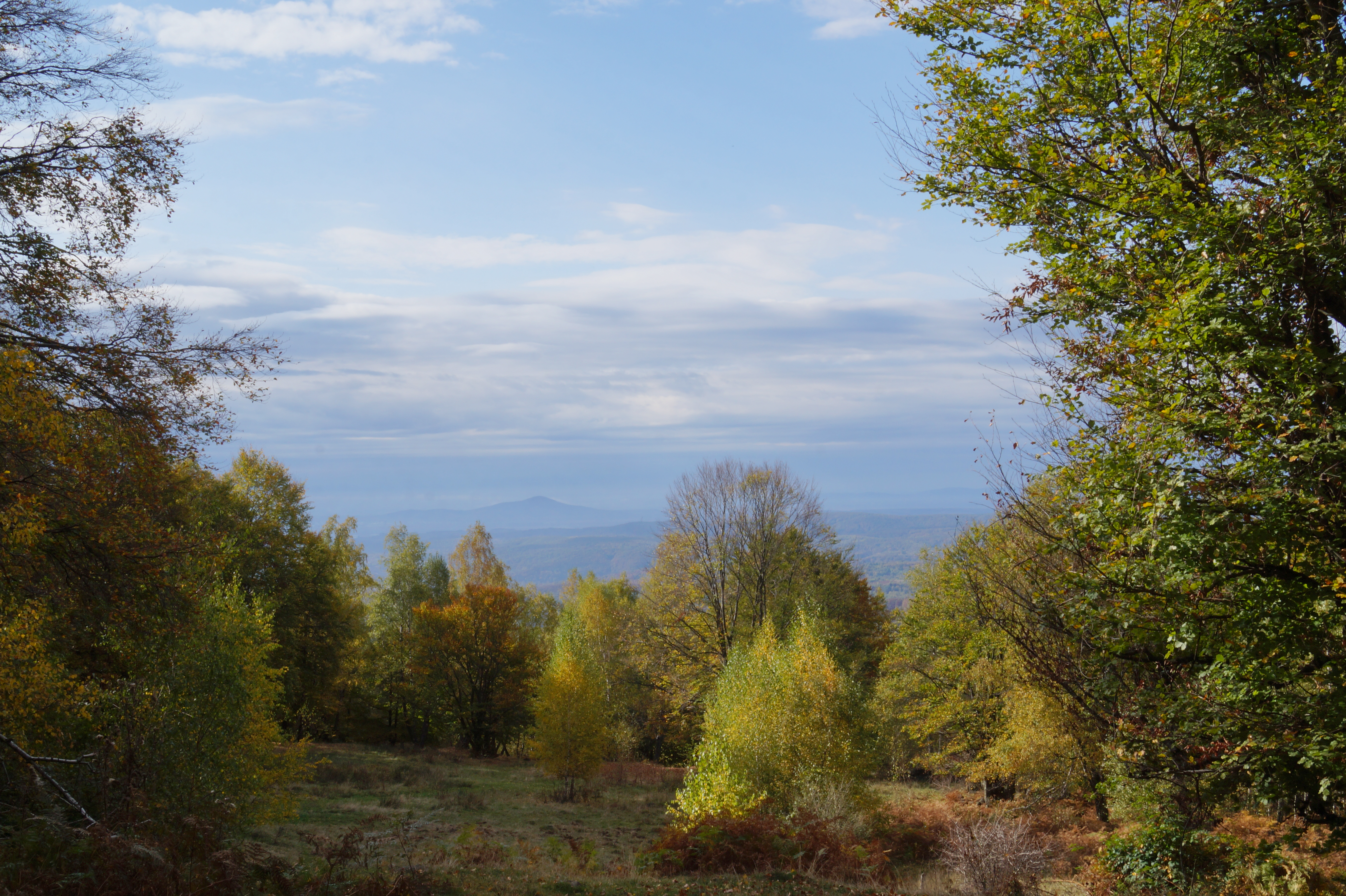 Осінній краєвид у НПП "Зачарований край" НПП «Зачарований край», Іршавський р-н